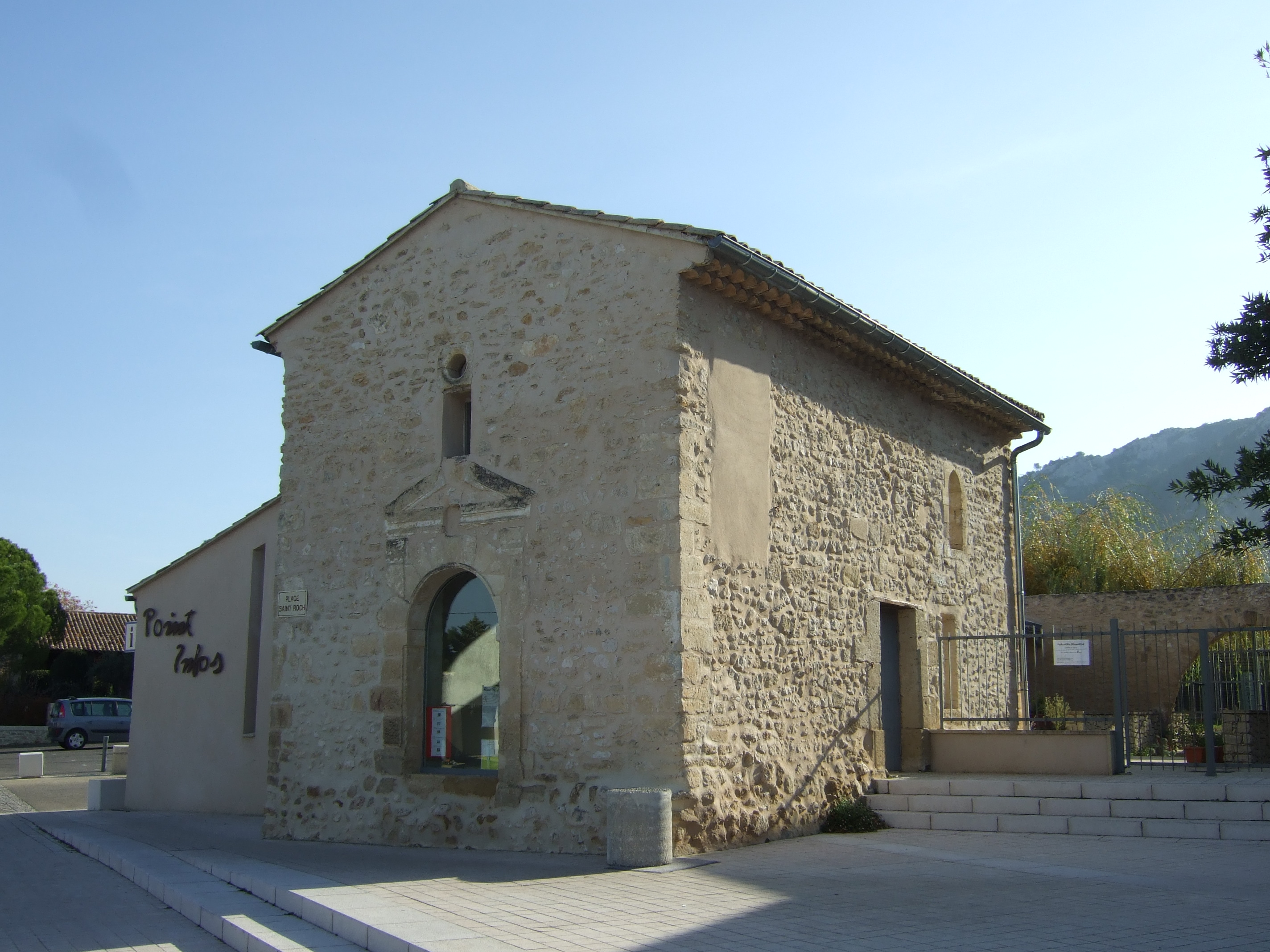 Place Saint Roch, à ROBION ( Vaucluse ) avec la chapelle Saint Roch transformée en point d'accueil touristique